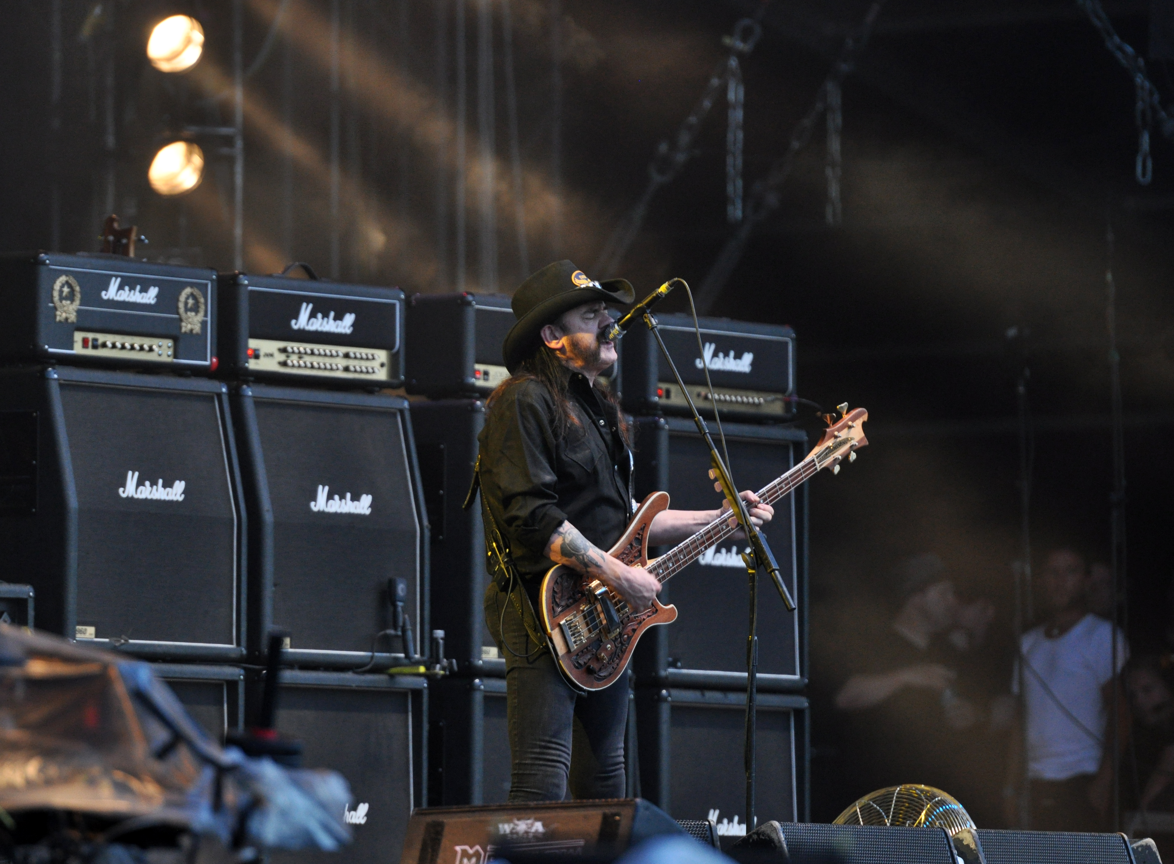 Motörhead at Wacken Open Air 2013